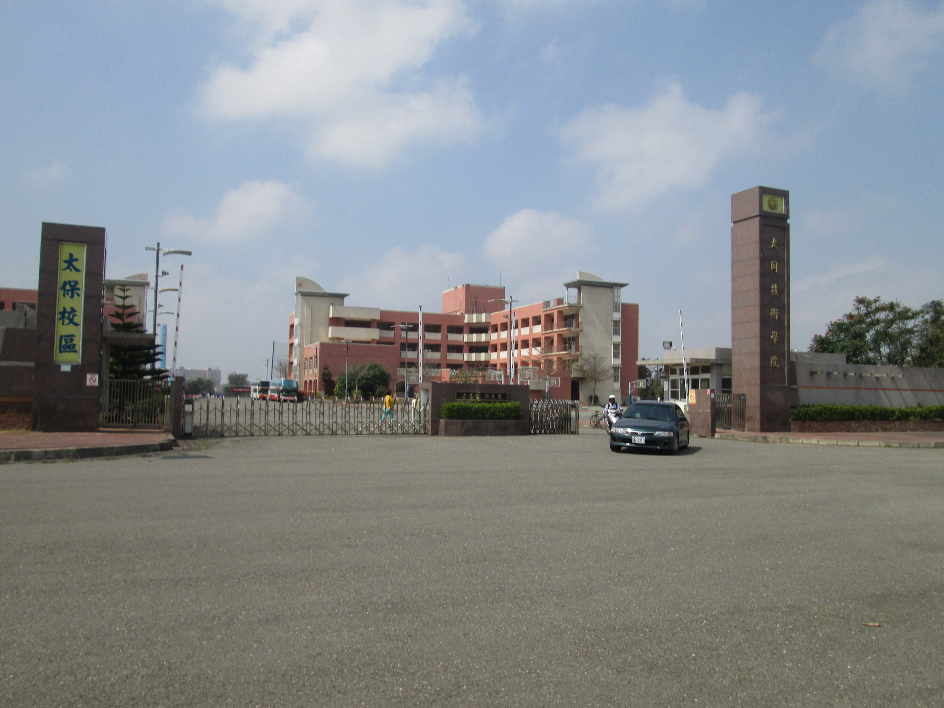 大同技術學院太保校區，地址：嘉義縣太保市學府路一段30號。